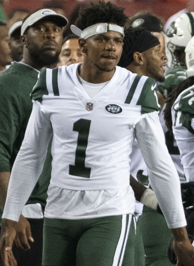 Jets at Redskins 8/16/18